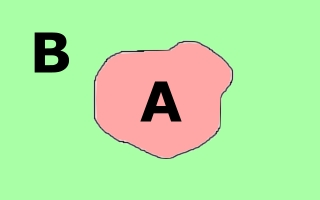 Schéma enklávy Zdroj: nakreslené - Vladimír Tóth Dátum: 17.12.2006 Autor: Ike - Vladimír Tóth Povolenie: PD Iné verzie tohto súboru: Nie